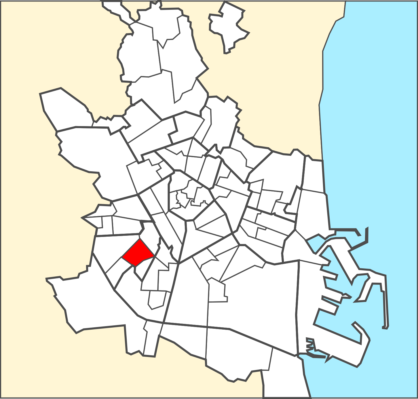 Localització del barri dins de la ciutat de València.